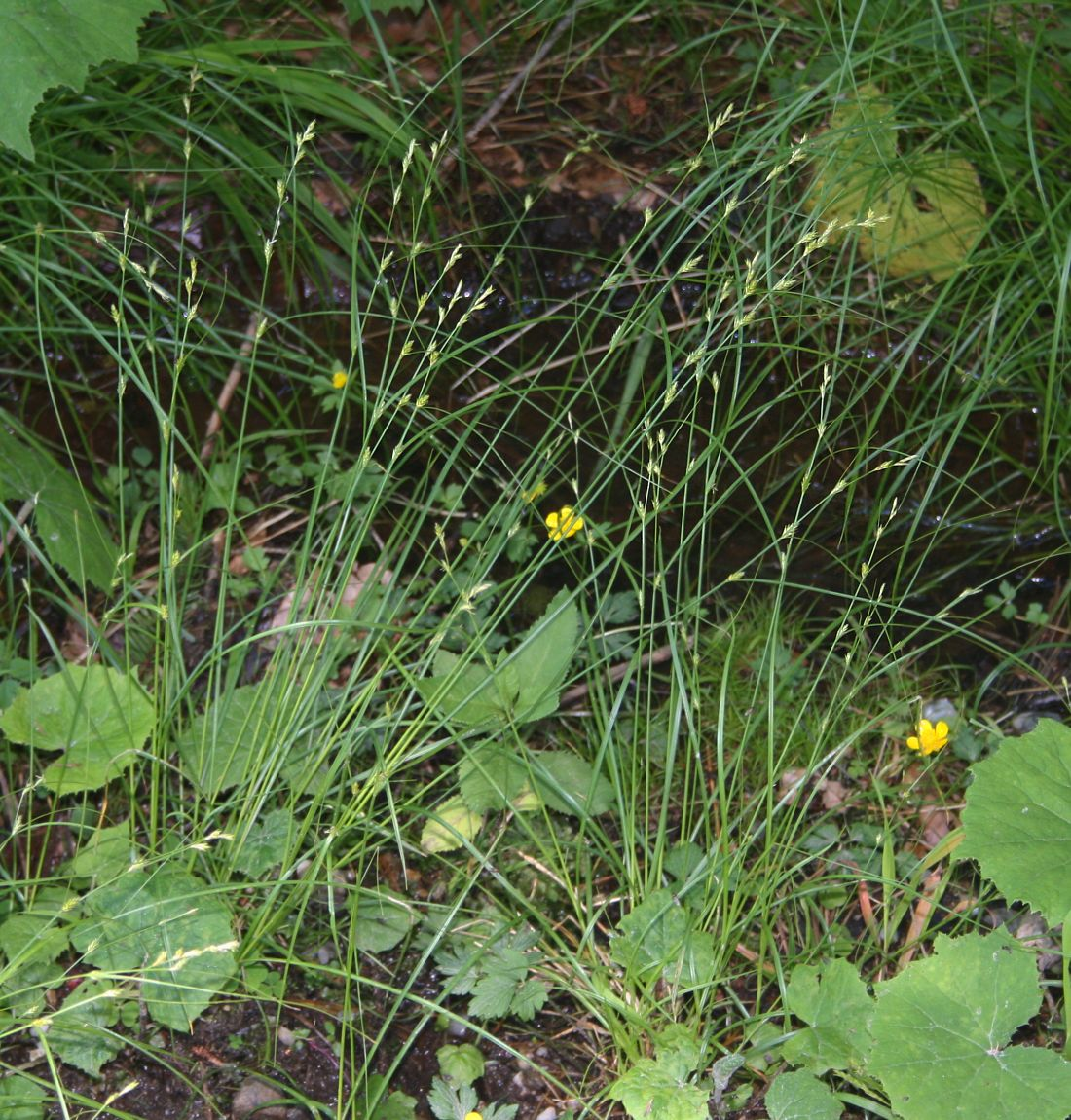 Winkel-Segge (Carex remota), Sauergräser (Cyperaceae) - Österreich/Austria/Autriche: Oberösterreich, Hausruckviertel, ca. 2.5 km NE Forsthaus Redltal, ca. 660 m s.m.